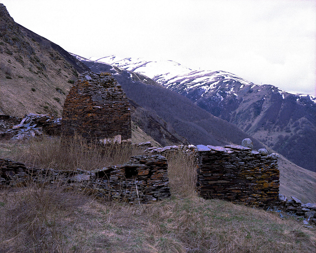 Святилище 'Хозы дзуар': над селением, на склоне горы лев. берега р. Льядон, Тапанкау, Алагирский район, Северная Осетия